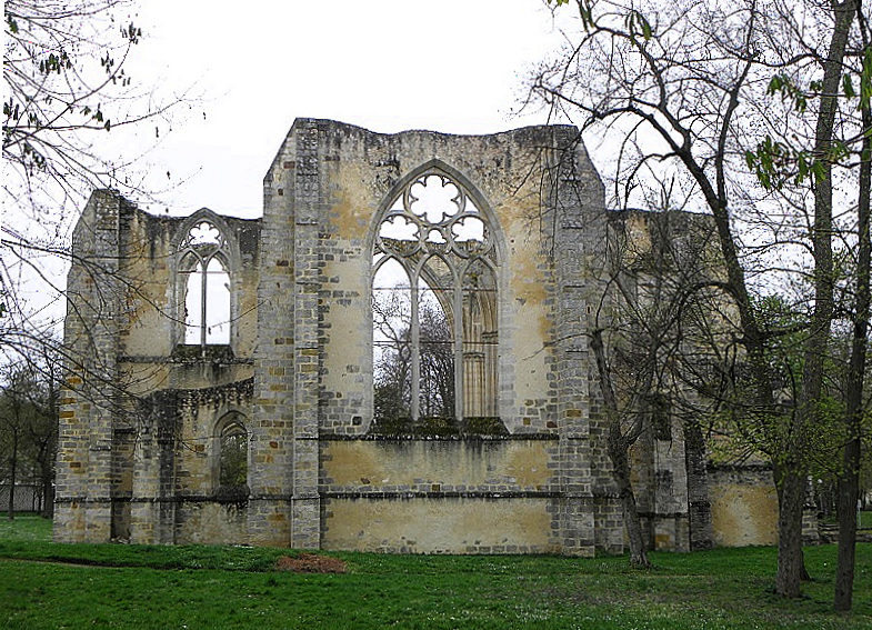 Chevet de l'abbatiale Notre-Dame du Lys à Dammarie-lès-Lys (77).